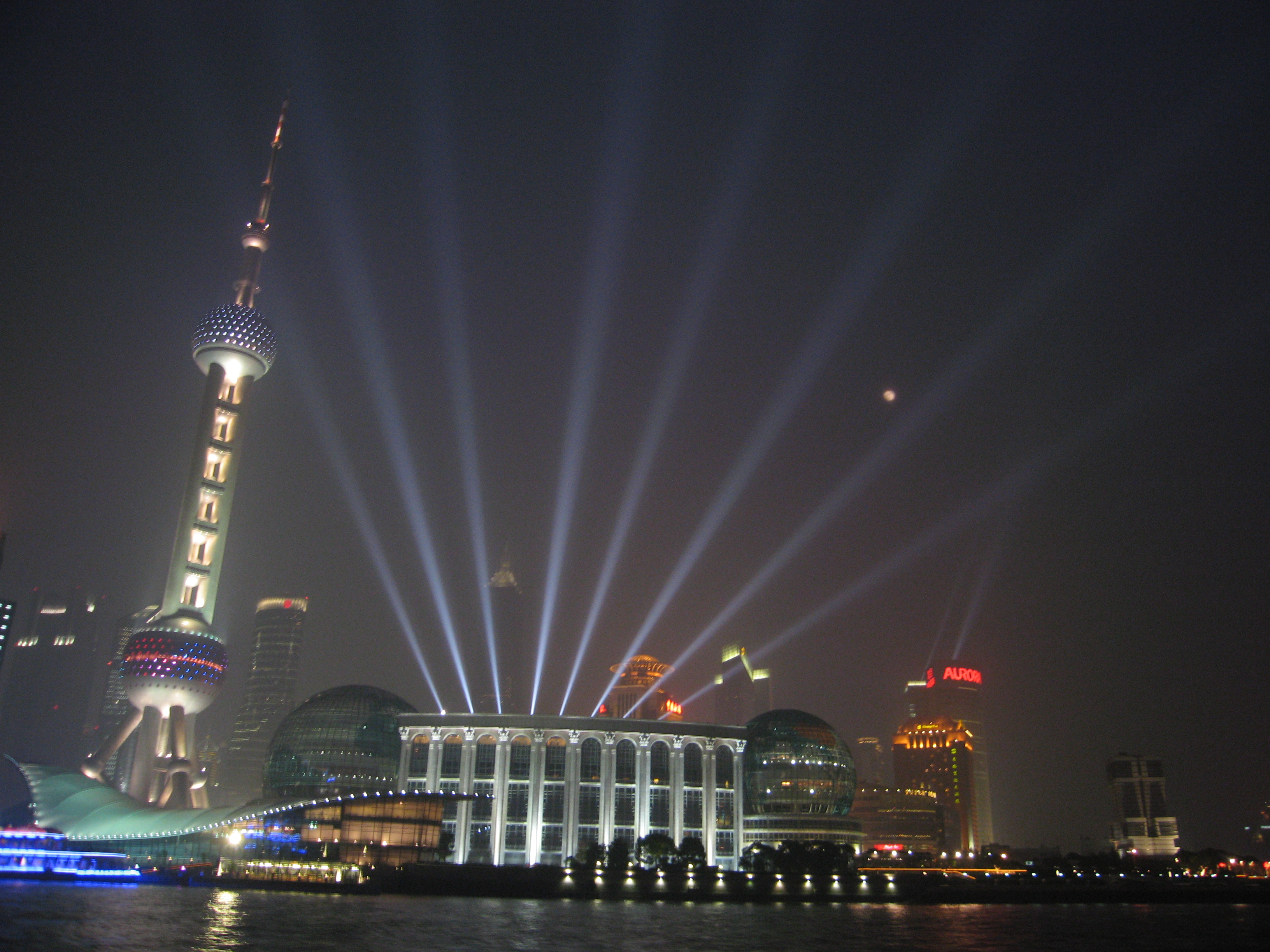 Shanghai pudong at night